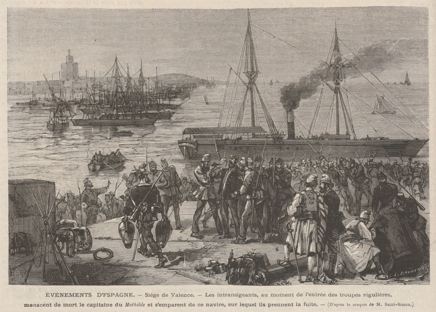 Événements d'Espagne. — Siége de Valence. — Les intransigeants, au moment de l'entrée des troupes régulières, menacent de mort le capitaine du Mathilde et s'emparent de ce navire, sur lequel ils prennent la fuite..